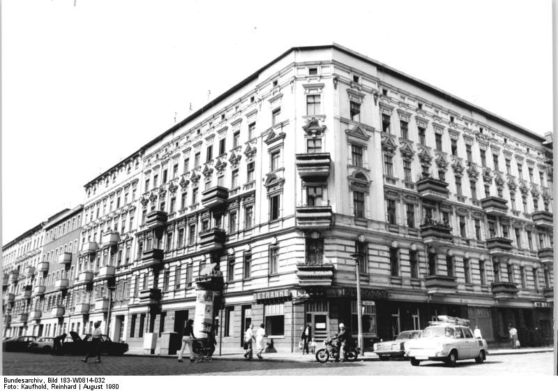 ADN-ZB-Kaufhold-14.8.80-Berlin: die neuen Fassaden der Häuser in der Duncker- Ecke Raumerstraße im Stadtbezirk Prenzlauer Berg laden zum längeren Betrachten ein.